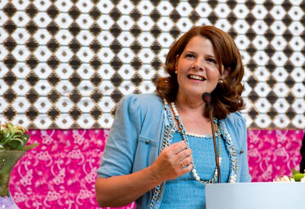 Minister Van Bijsterveldt-Vliegenthart spreekt in de Hoftoren, het gebouw van OCW, op 14 oktober 2010.